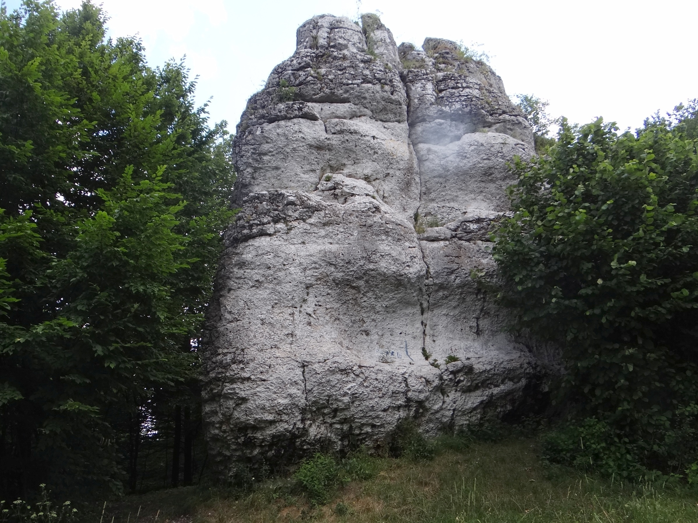 Balkony (Pomorzańskie Skałki)